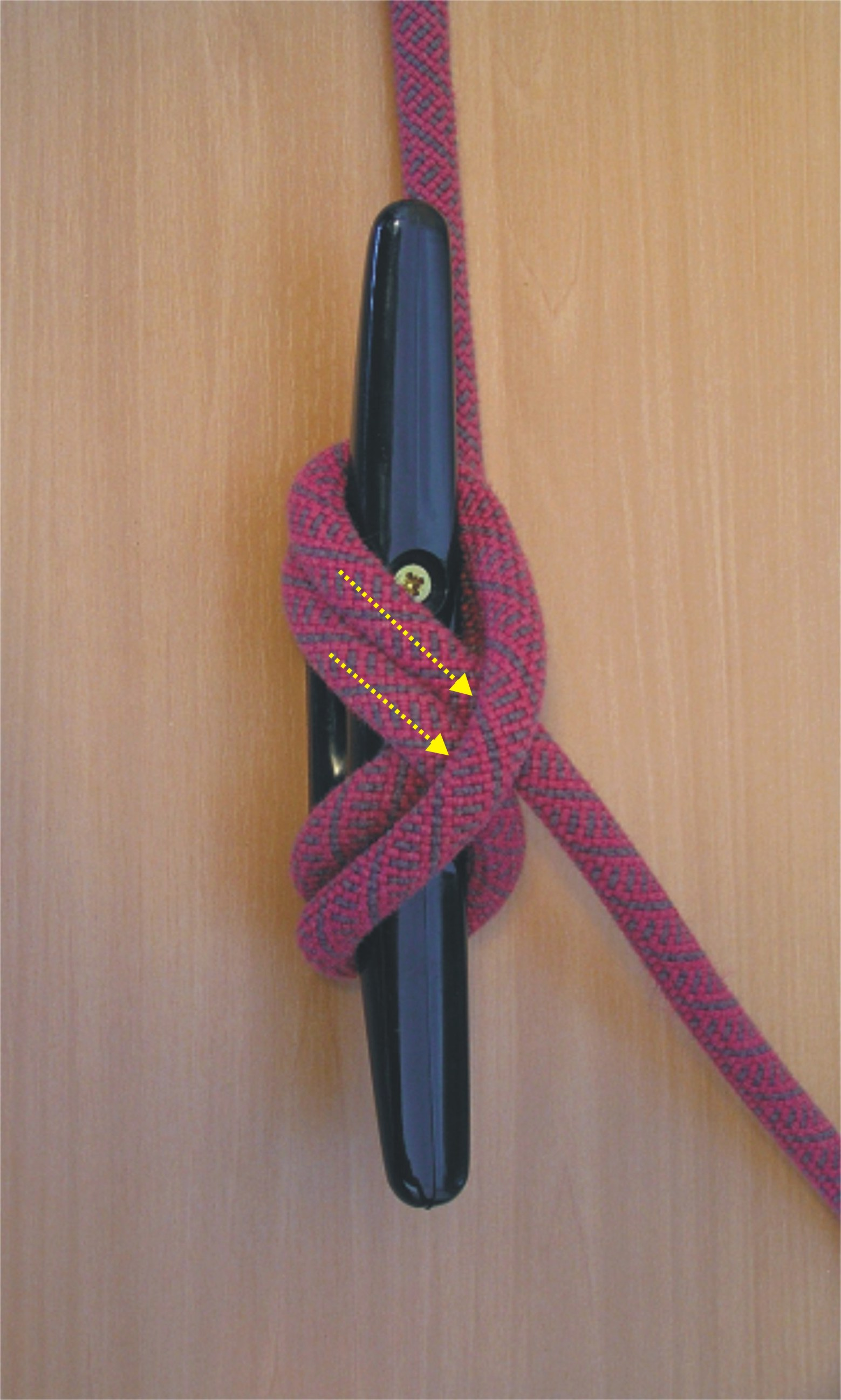 Stecken eines korrekten Kopfschlages auf eine Klampe, der sehr gut hält